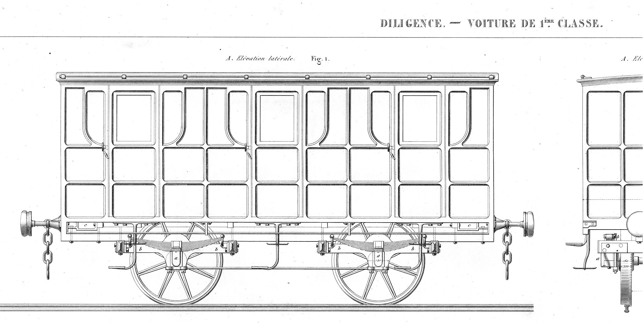 Chemin de fer de Strasbourg à Bâle - Coupe longitudinale d'une voiture de 1ère classe (Diligence).